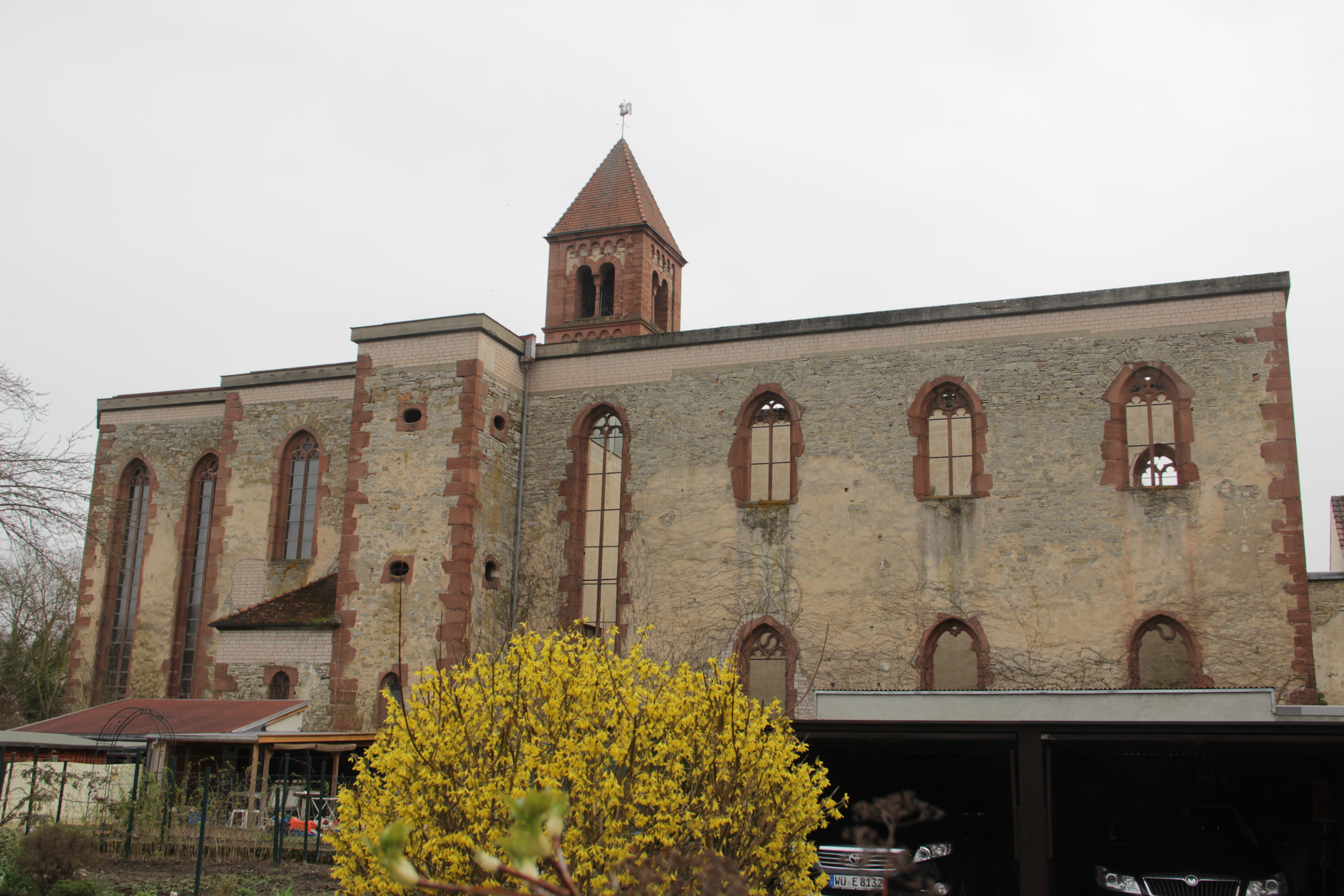 des in der 1. H. des 13. Jahrhunderts gegründeten und 1803 säkularisierten Prämonstratenserinnenklosters, jetzt evang.-luth. Pfarrkirche, sog. Versöhnungskirche, Ruine mit eingefügtem Neubau, Saalbau mit eingezogenem Chor und südlichem, fünfgeschossigen Turm mit Pyramidendach, die unteren Geschosse Mitte 13. Jahrhundert, Langhaus und Chor in nachgotischen Formen erneuert, von Lazaro Augustino, 1609-11, im Zweiten Weltkrieg stark zerstört, Reste des ehemals Kreuzganges, 17. Jahrhundert